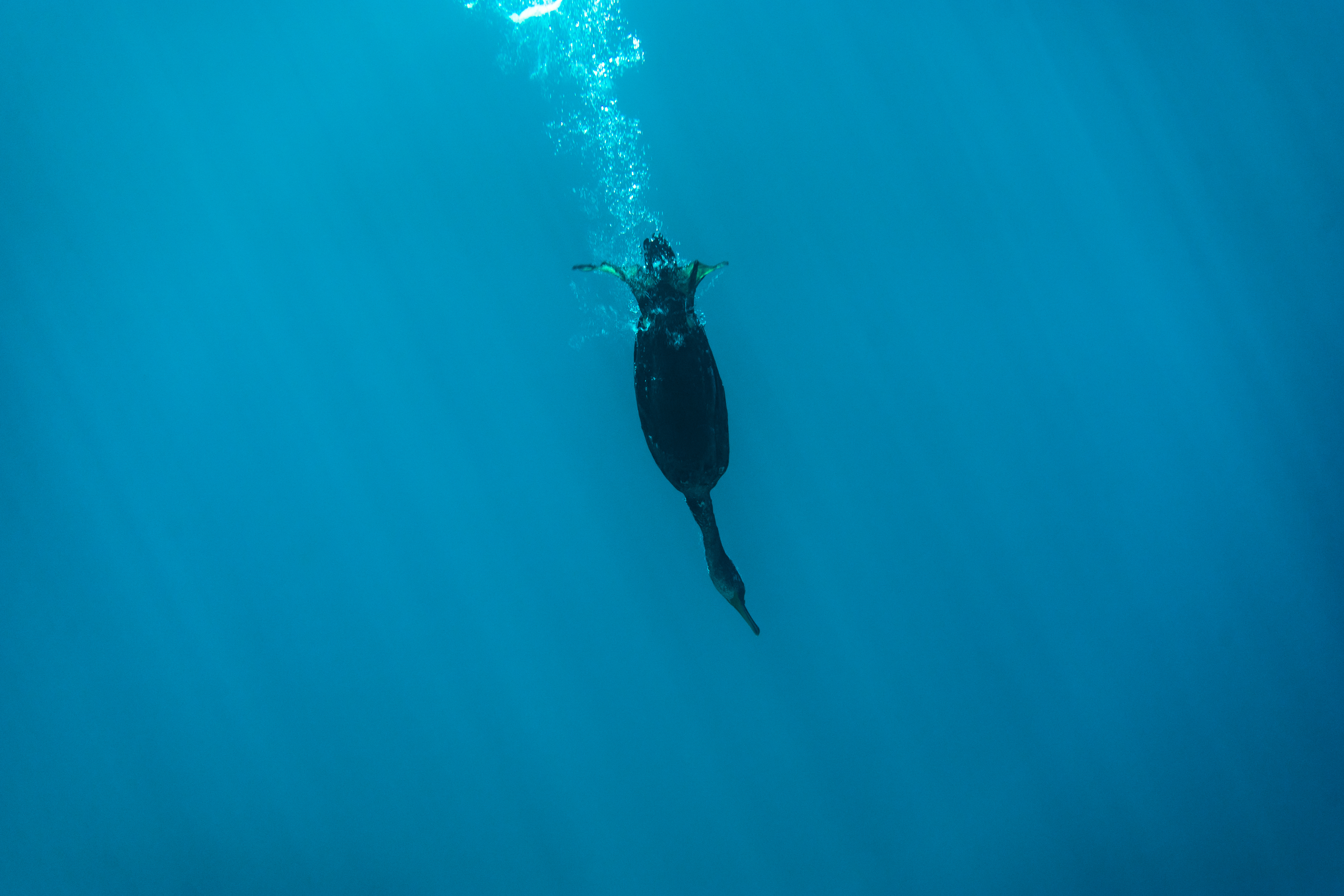 A cormorant bird dives into the blue water. This is a photography of Natura 2000 protected area with ID GR2220005